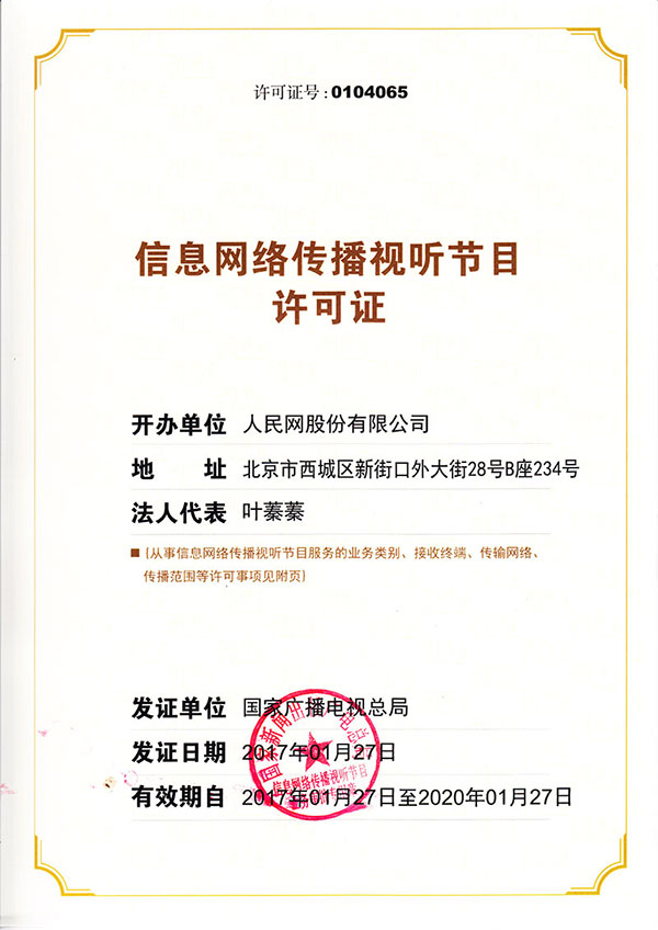 《信息网络传播视听节目许可证》（编号0104065）